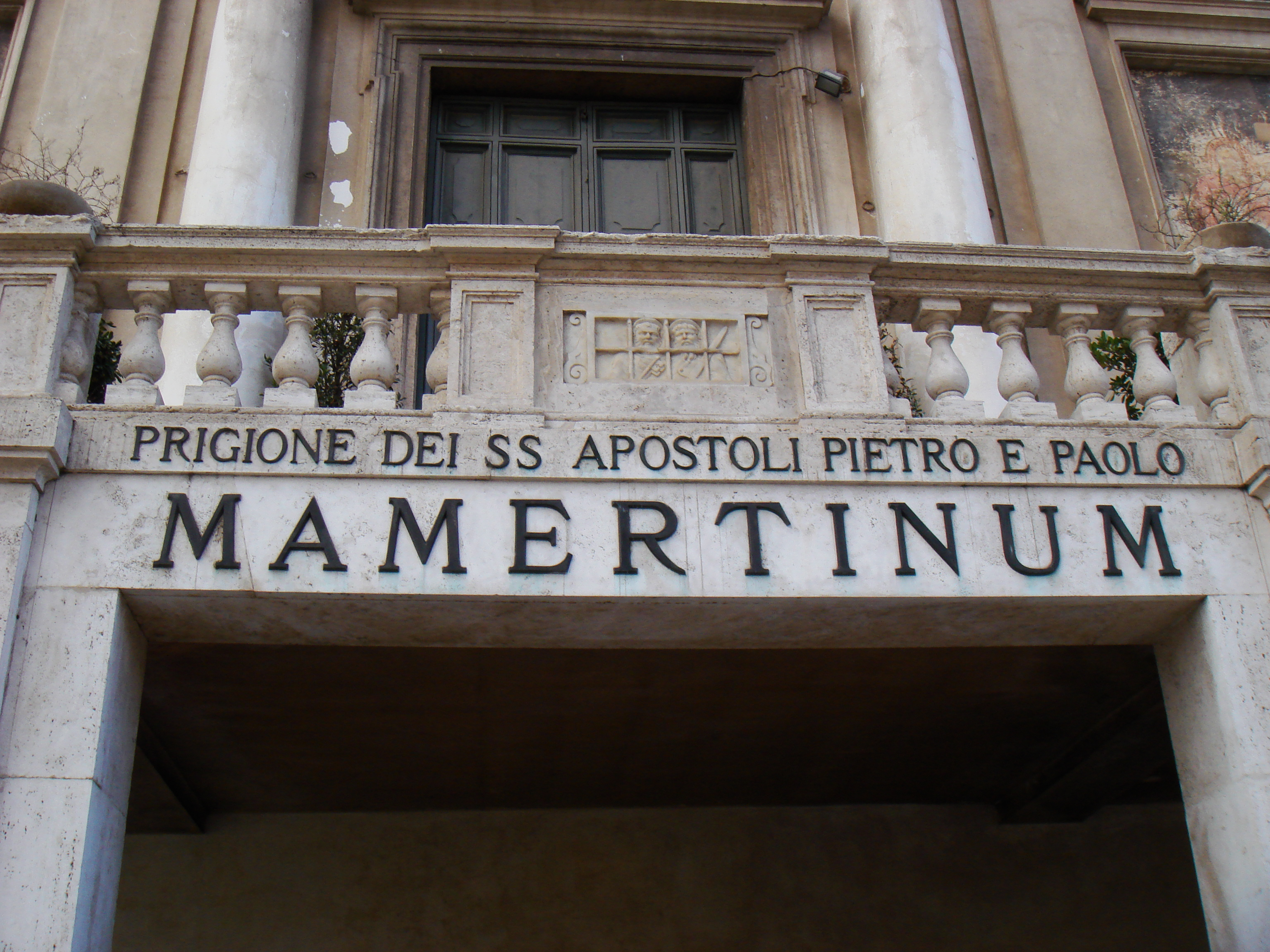 Il Carcere Mamertino (antico carcere di Roma). Ingresso.